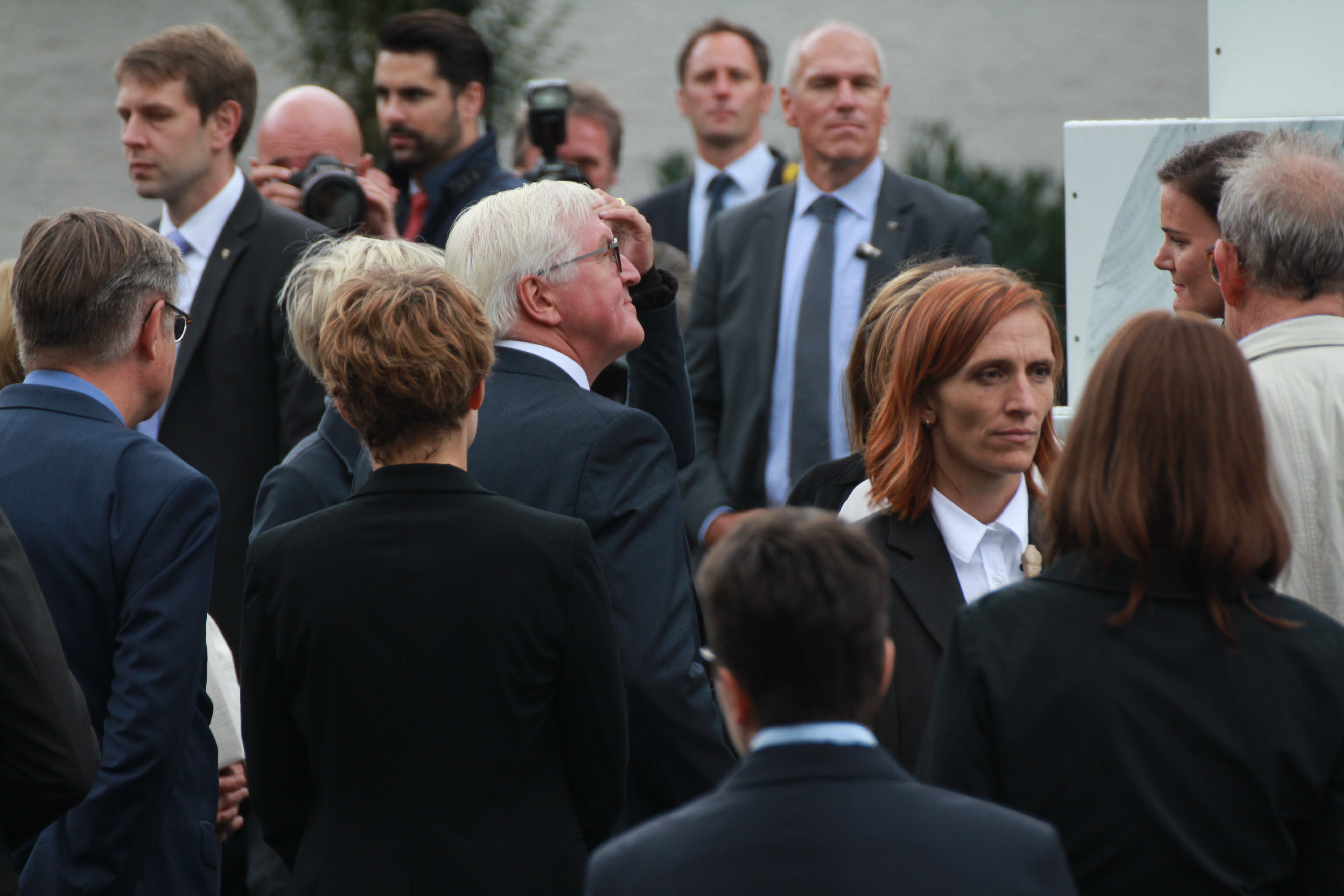 Am 31. August 2017 besuchte Bundespräsident Frank-Walter Steinmeier Münster, um die "Skulptur Projekte 2017" zu sehen. Einem Rundgang zu den in der Stadt verteilten Skulpturen folgte ein Empfang im Friedenssaal. Hier: Steinmeier besichtigt das Skulptur Projekt "Peles Empire" von Barbara Wolff und Katharina Stöver